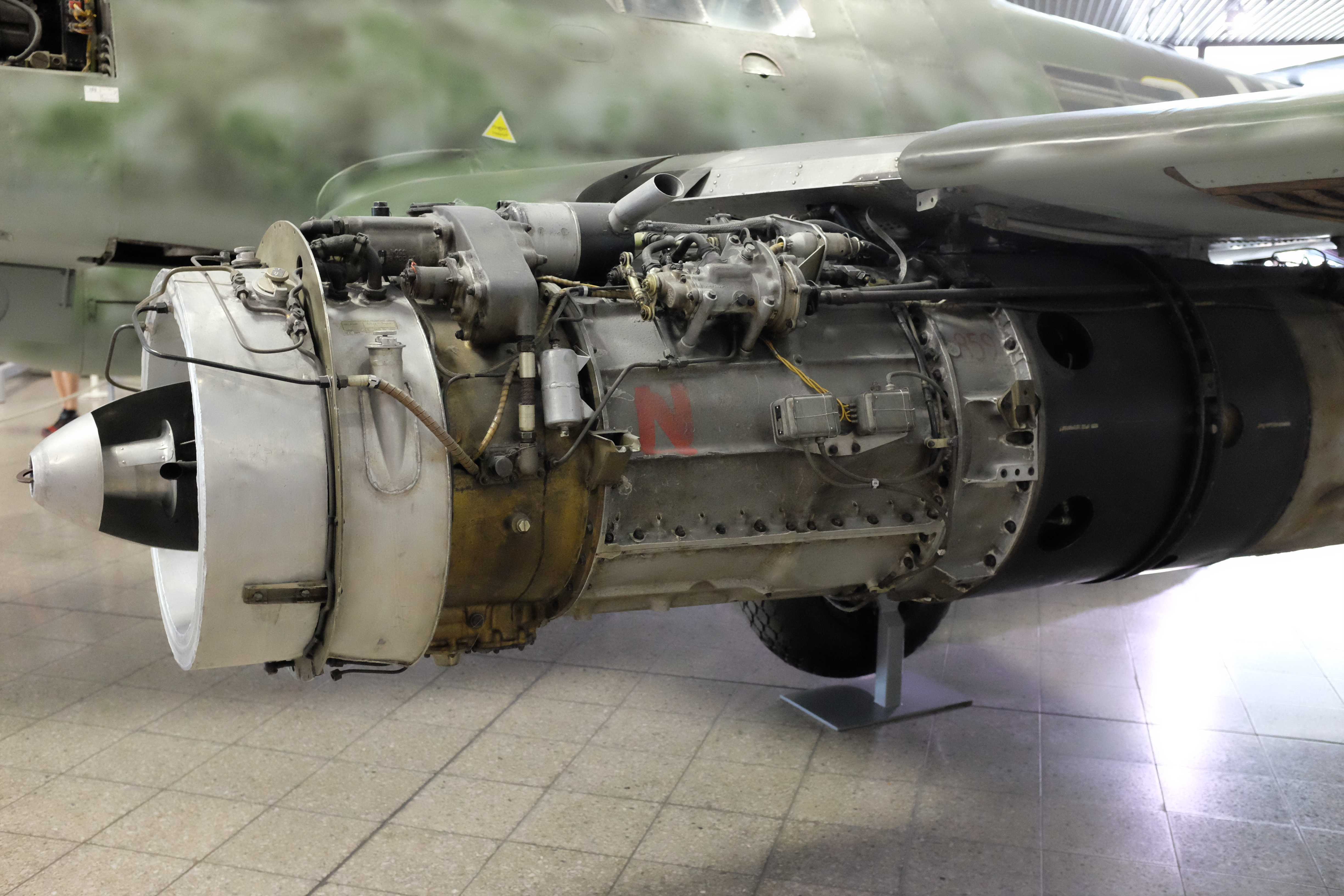 Particolare del motore a turbogetto del Messerchmitt 262 esposto al Deutsches Museum.